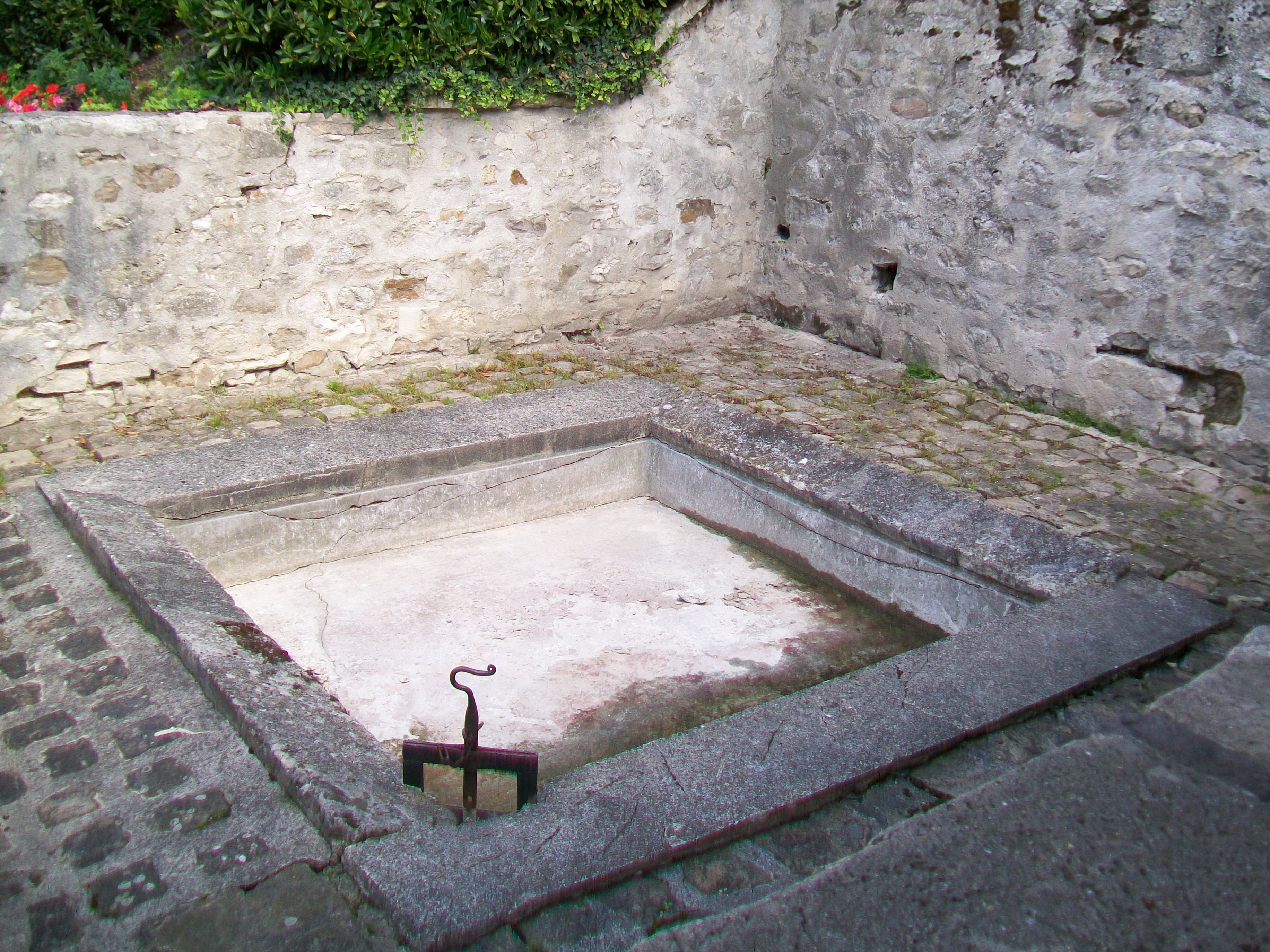 Le petit bassin du lavoir de Frontignon, destiné au lavage de sacs d'engrais, de couches et d'autres textiles sales. Ce bassin a été ajouté en 1895.